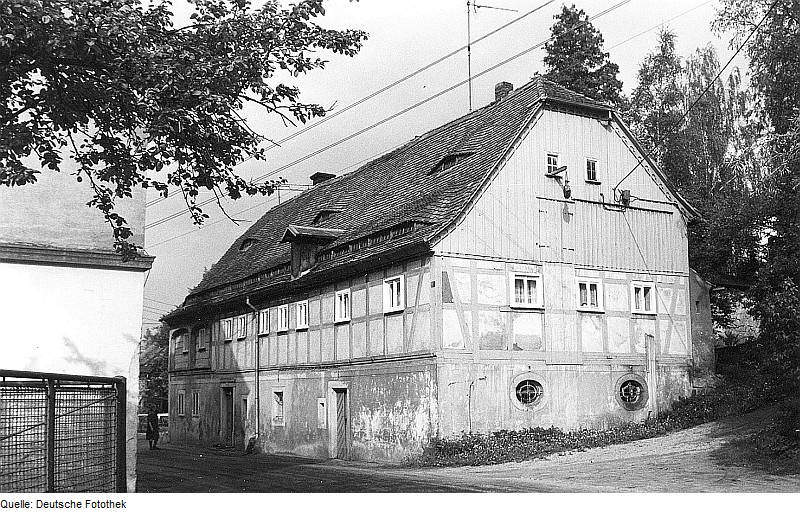 Original image description from the Deutsche FotothekBerthelsdorf. Ehem. Mühle (Hauptstraße 35)